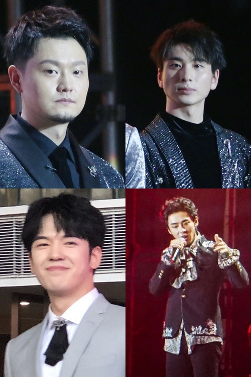 中文（中国大陆）: 顺时针自左上：鞠红川、蔡程昱、高天鹤、仝卓